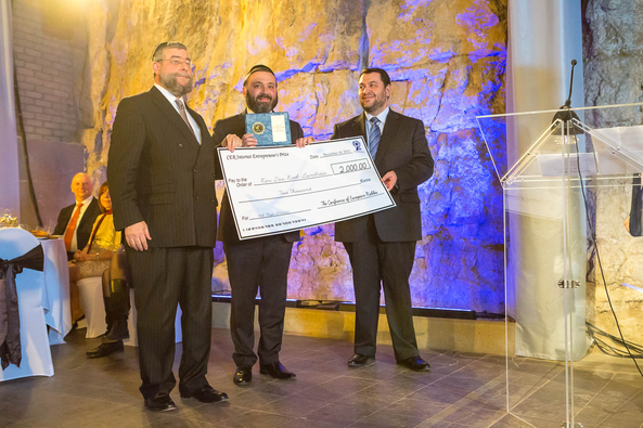 Le Rav Dov Roth-Lumbroso reçoit le prix de l'entreprenariat de la conférence des Rabbins euopéens